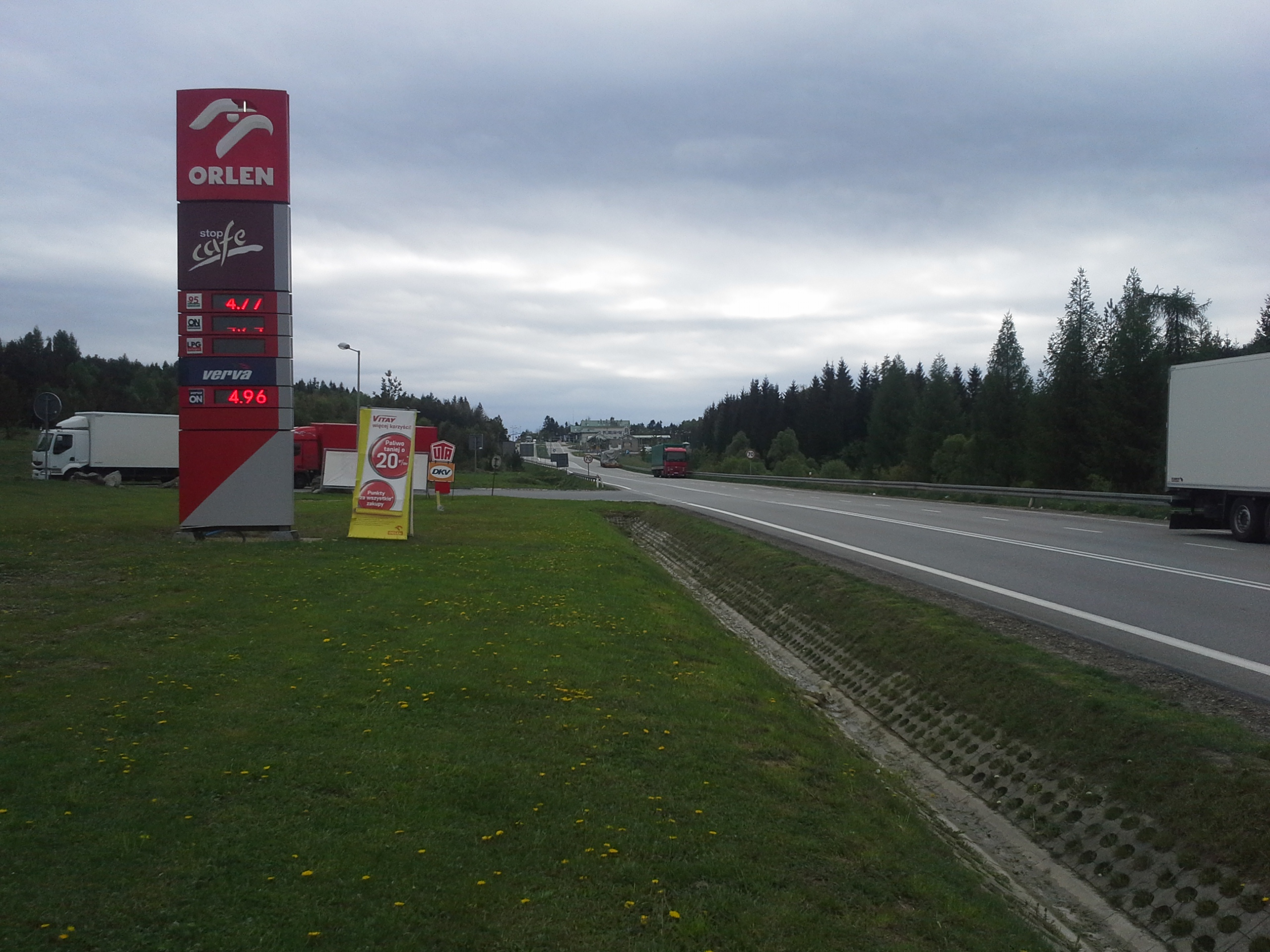 Barwinek, ulica graniczna w głębi nieistniejące już przejście graniczne Barwinek-Vyšný Komárnik, między Polską, a Słowacją przy międzynarodowej trasie E371.